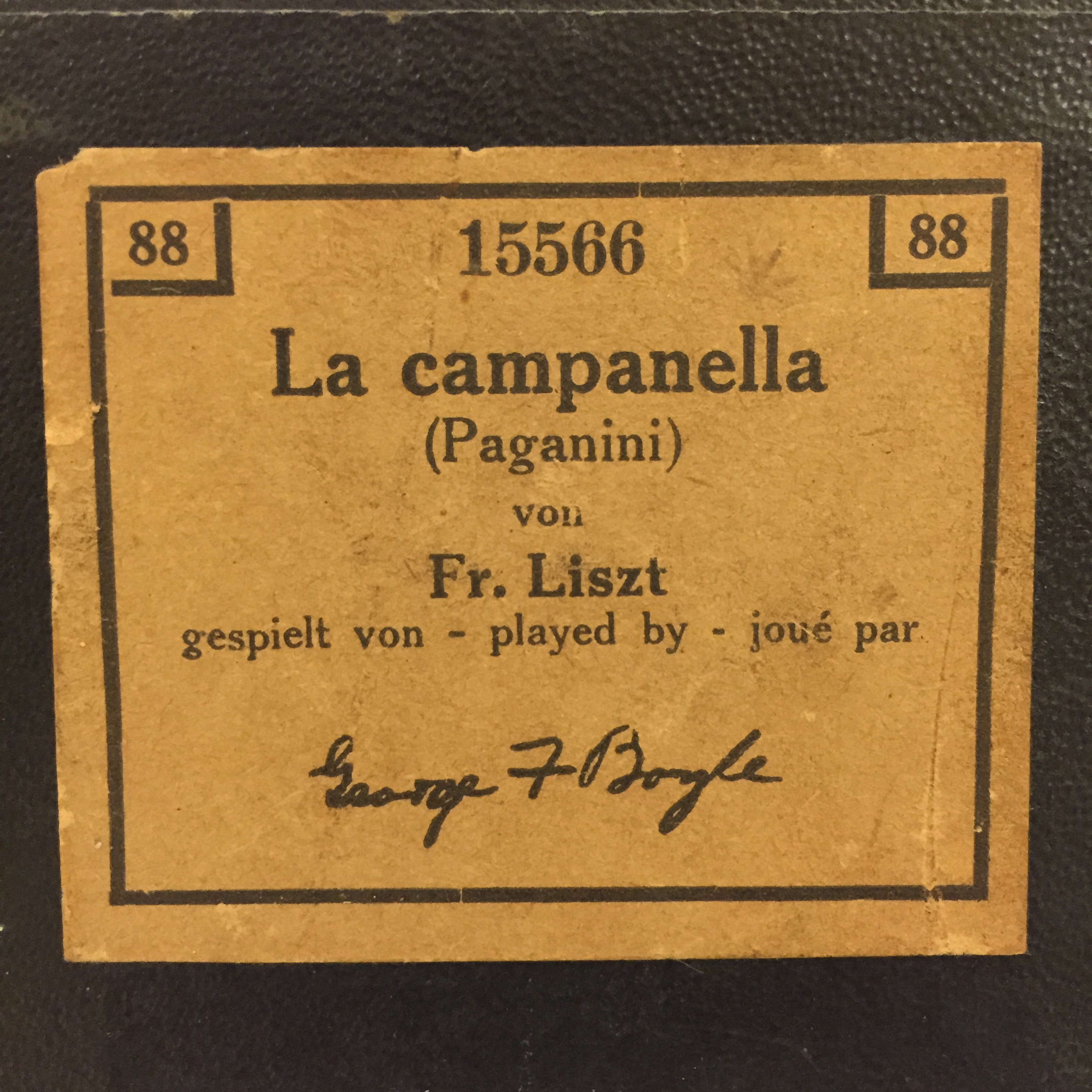 Rotlle de pianola interpretat per George F. Boyle: La Campanella, de Franz Liszt